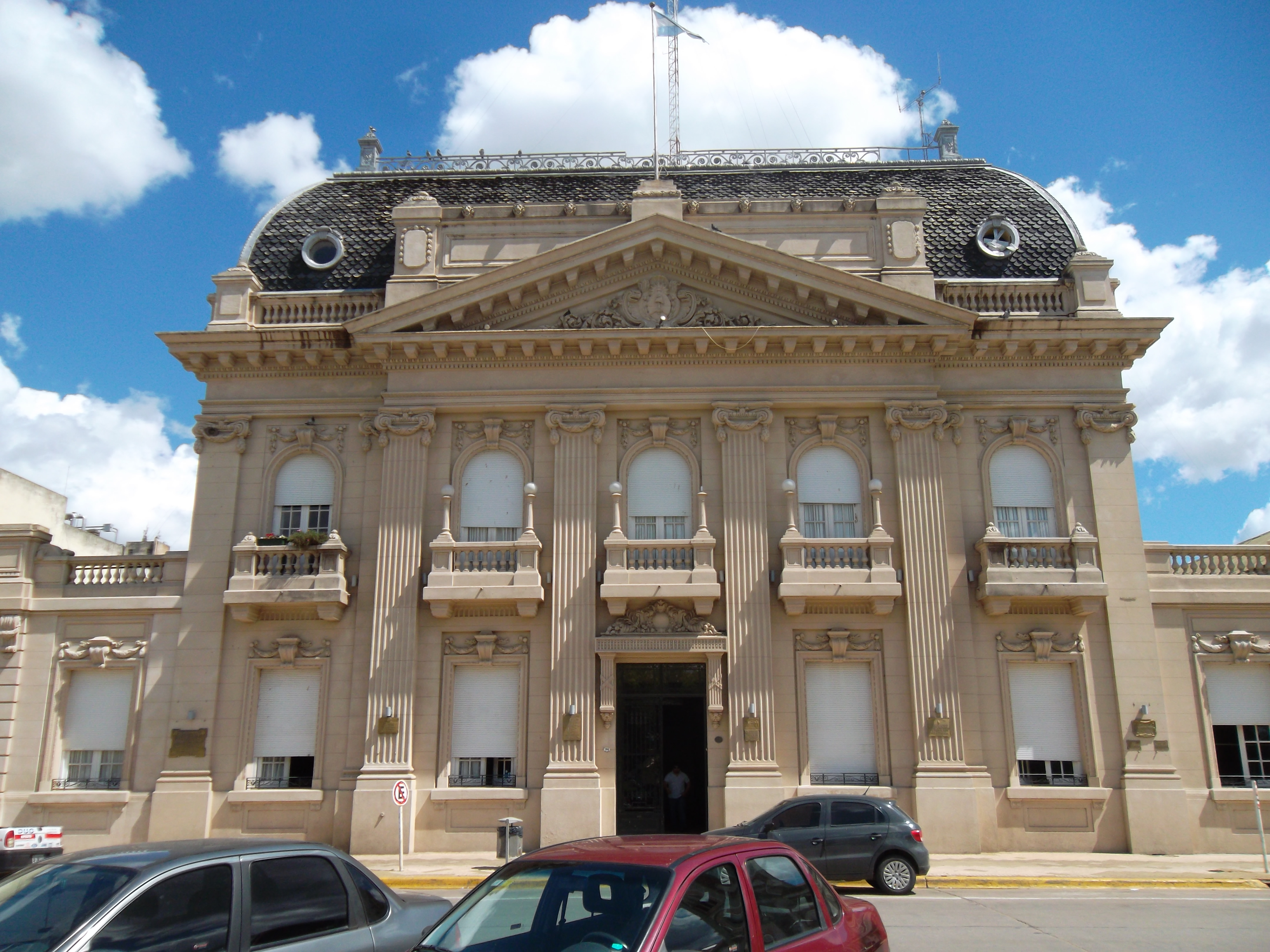 Edificio de la munipalidad